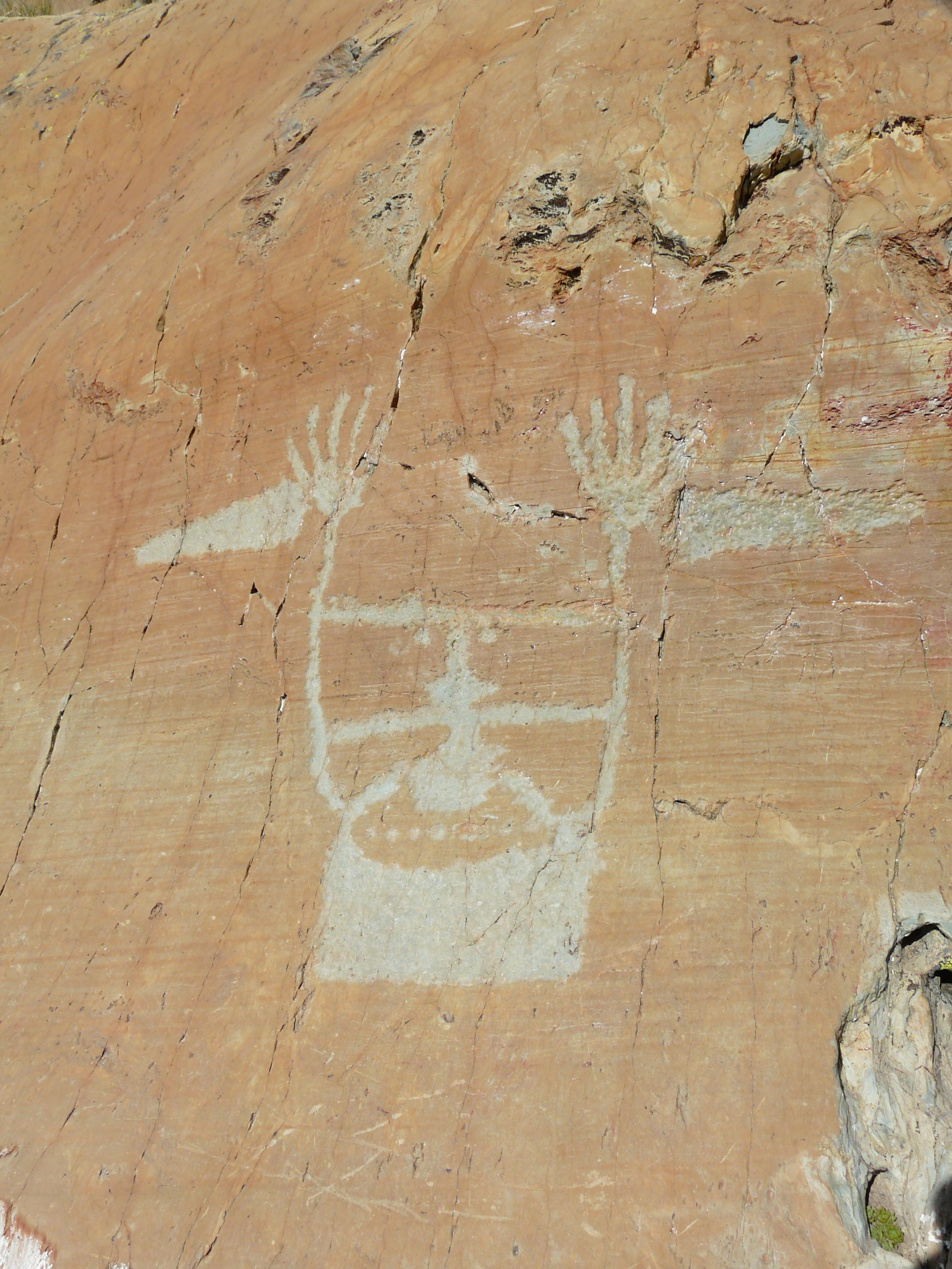 Gravures rupestres de la vallée des Merveilles (Classé Inscrit). Le sorcier .